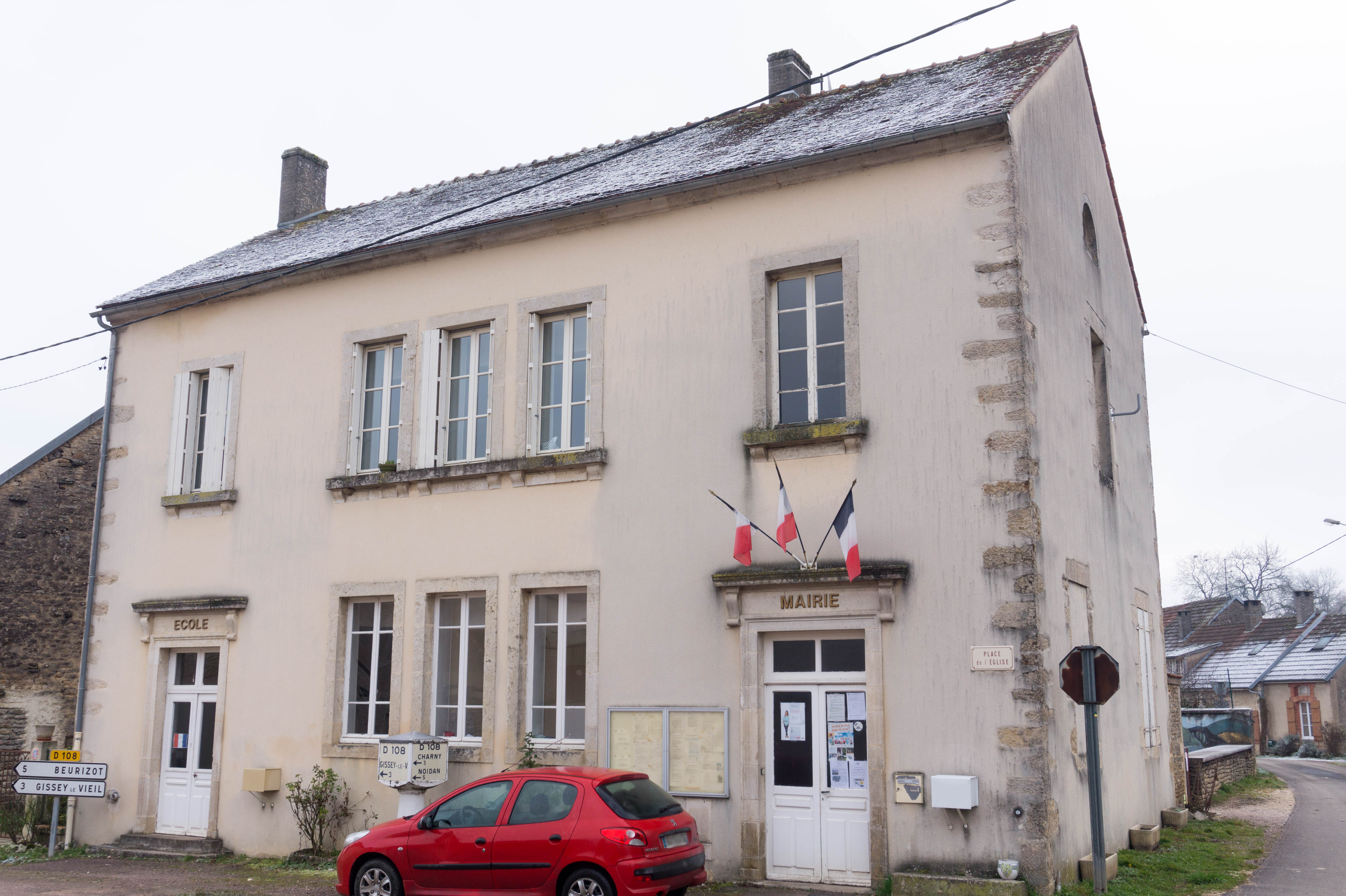 Mairie